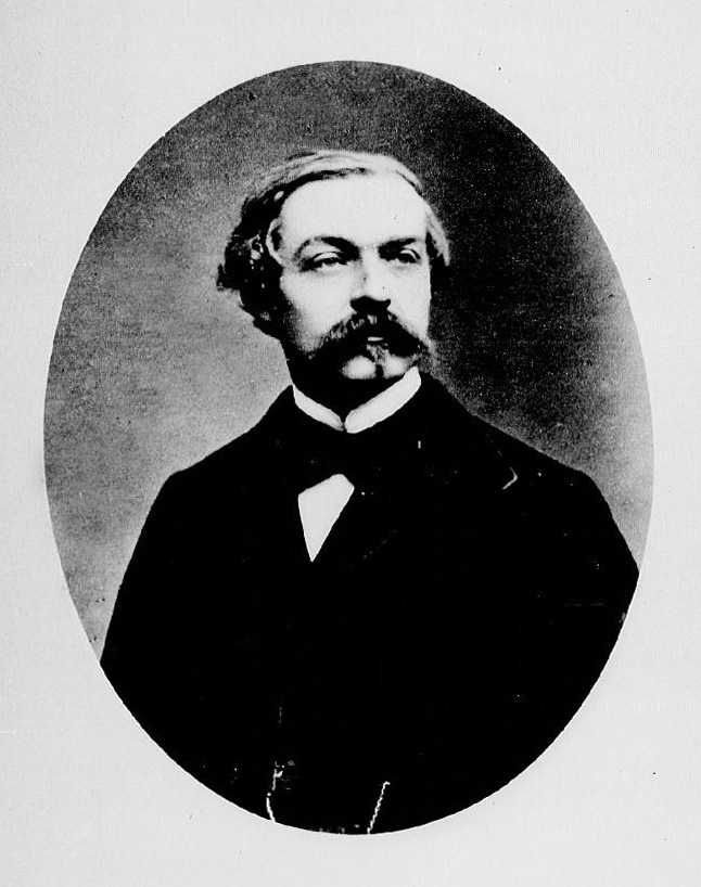 Auguste Laugel, Biographies alsaciennes avec portraits en photographie, série 4